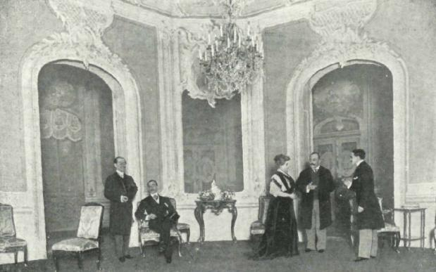 Los actores José Santiago, Mariano Díaz de Mendoza, María Cancio y Alfredo Cirera en una escena de la obra de teatro Añoranzas, de Manuel Linares Rivas